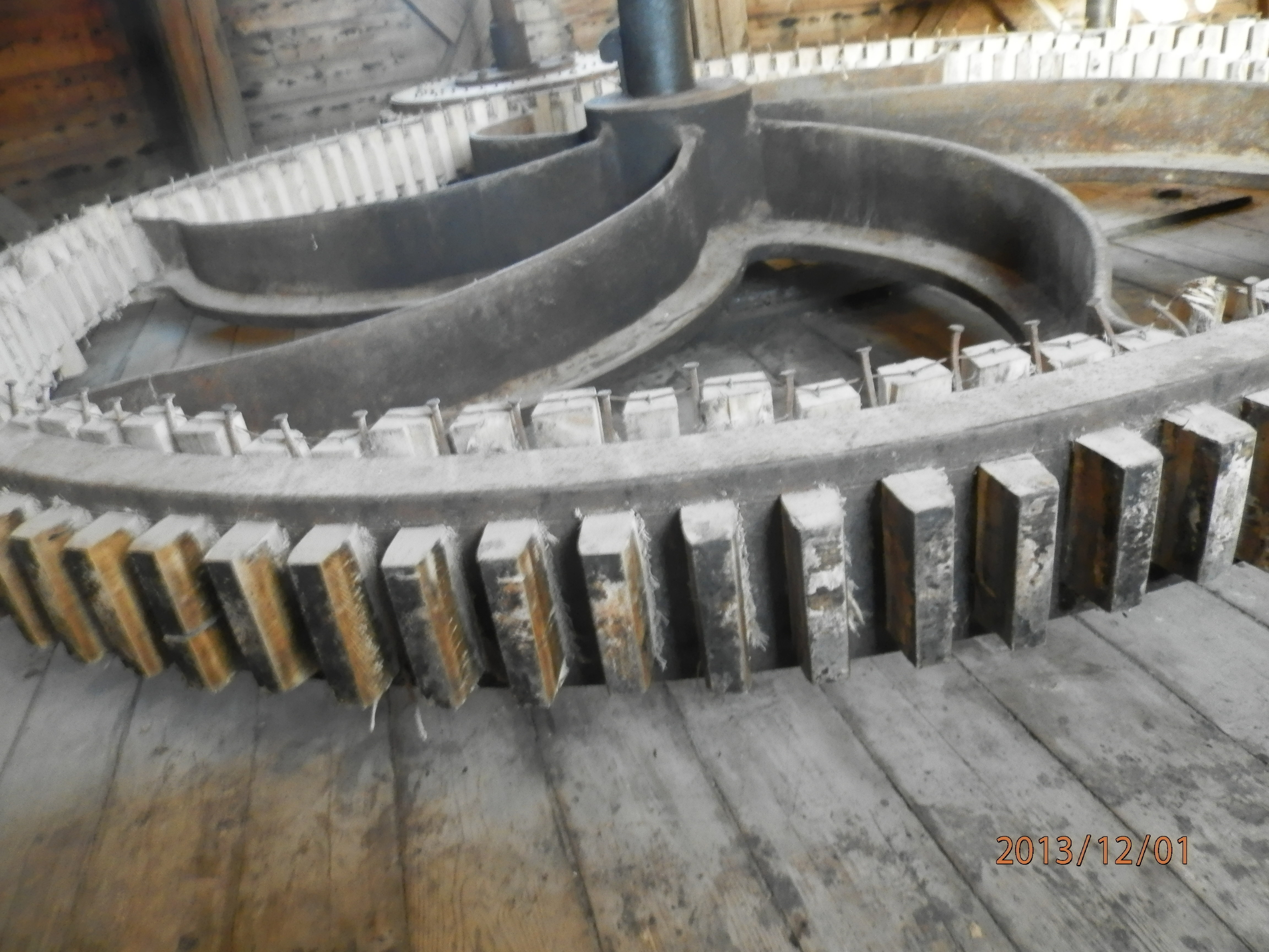 Stjernehjulet i Ramløse Mølle